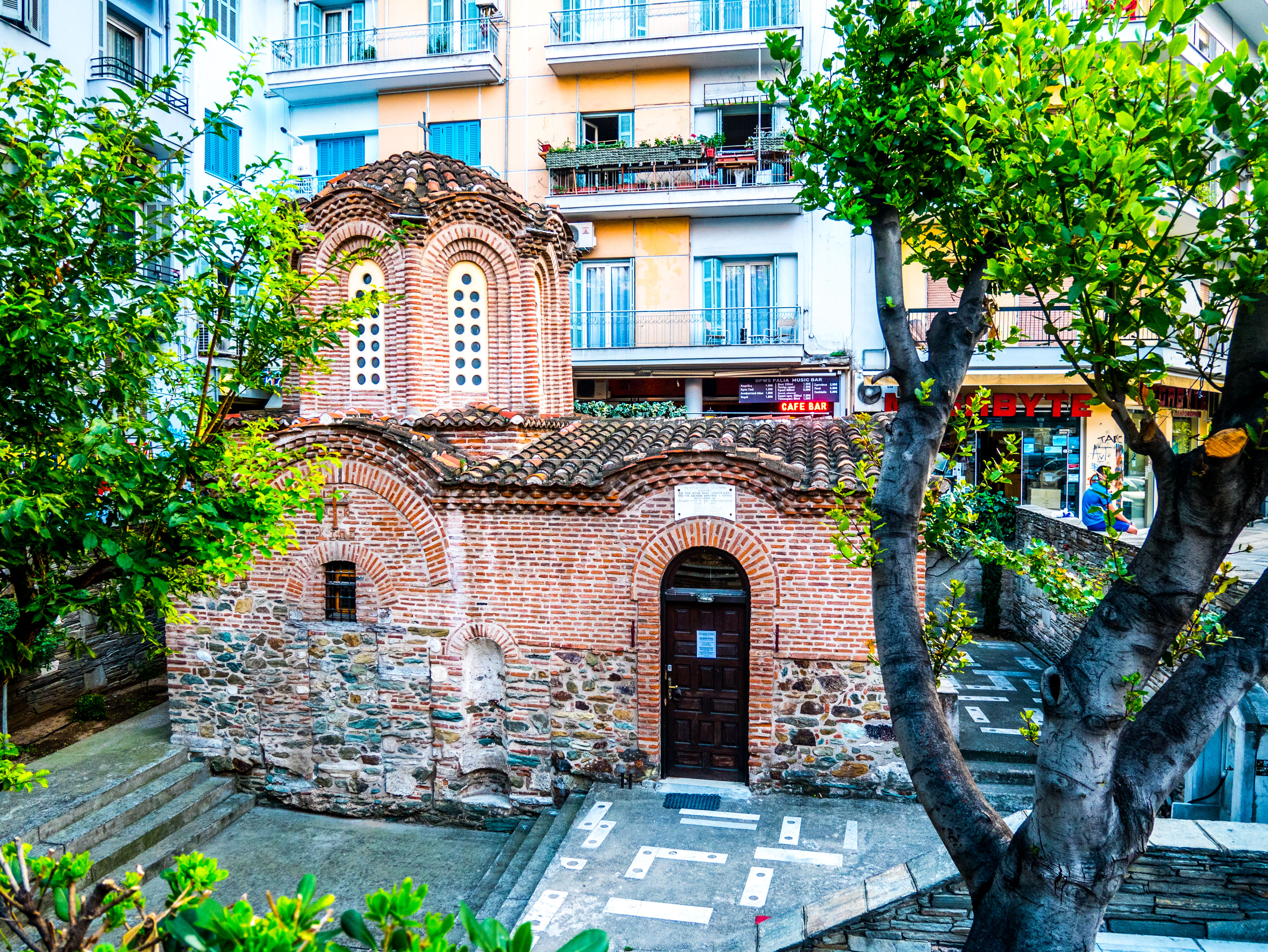 Ναΐδριο Σωτήρος Θεσσαλονίκης«Ναός Μεταμόρφωσης του Σωτήρα»